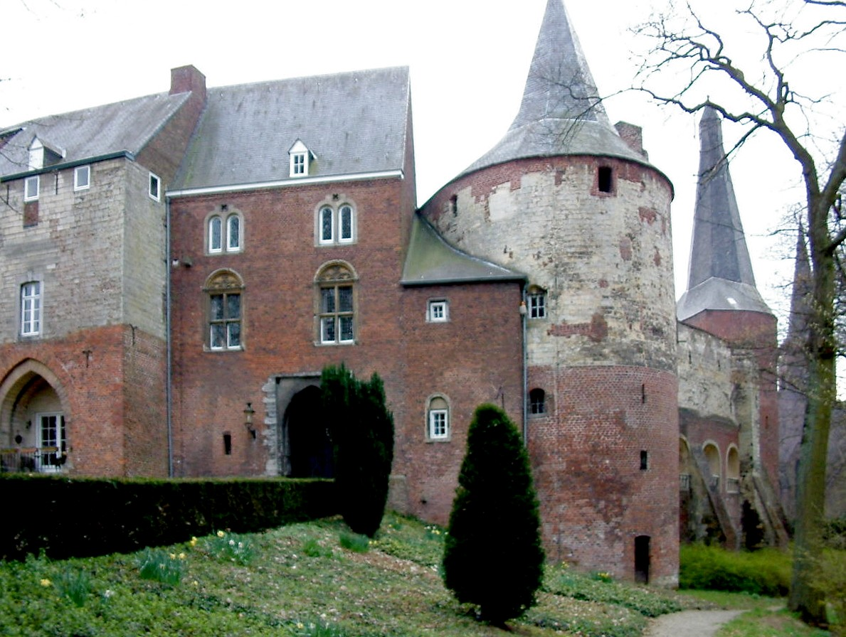 Kasteel Horn te Horn Limburg